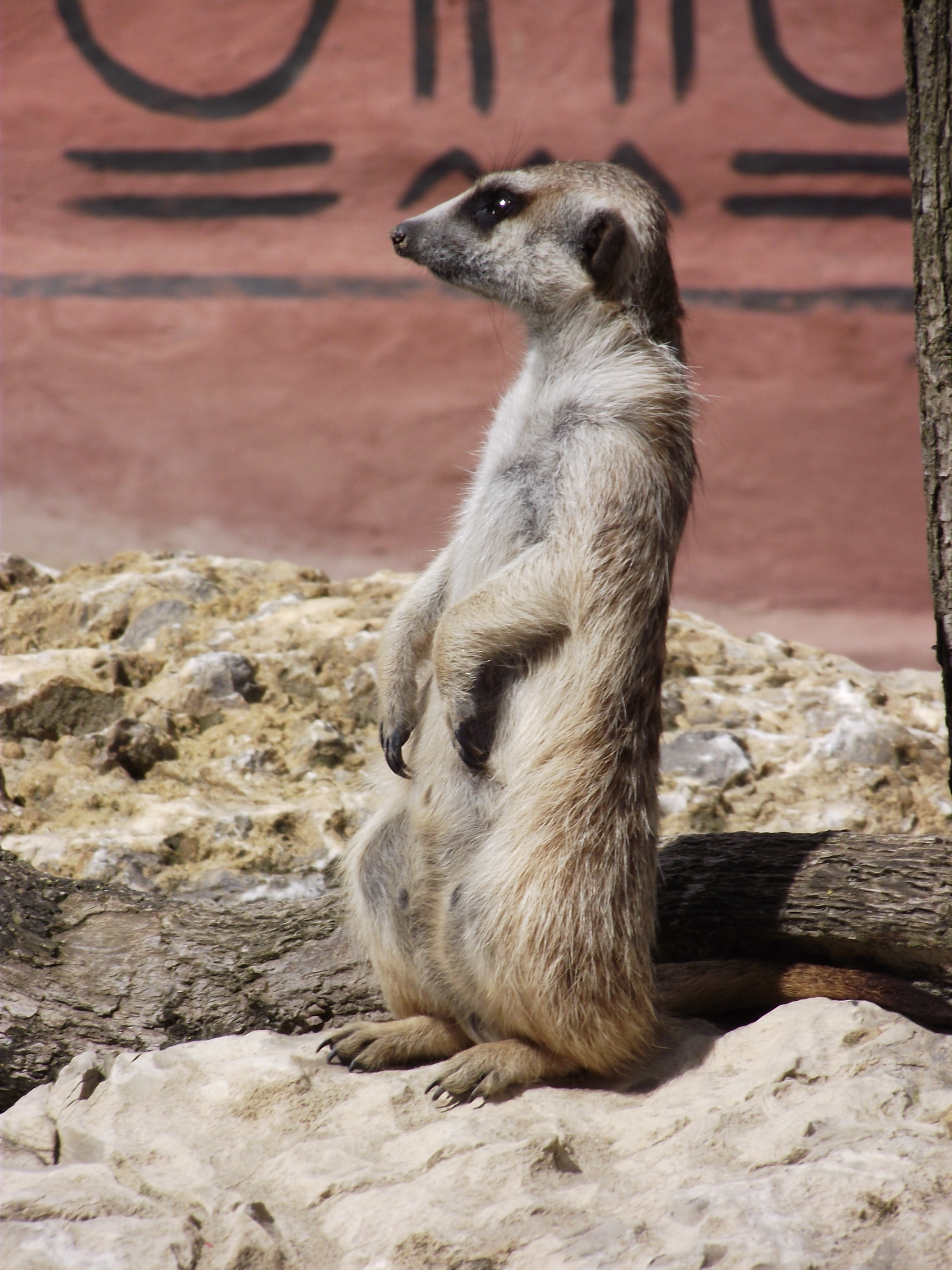 Suricate à Pairi Daiza